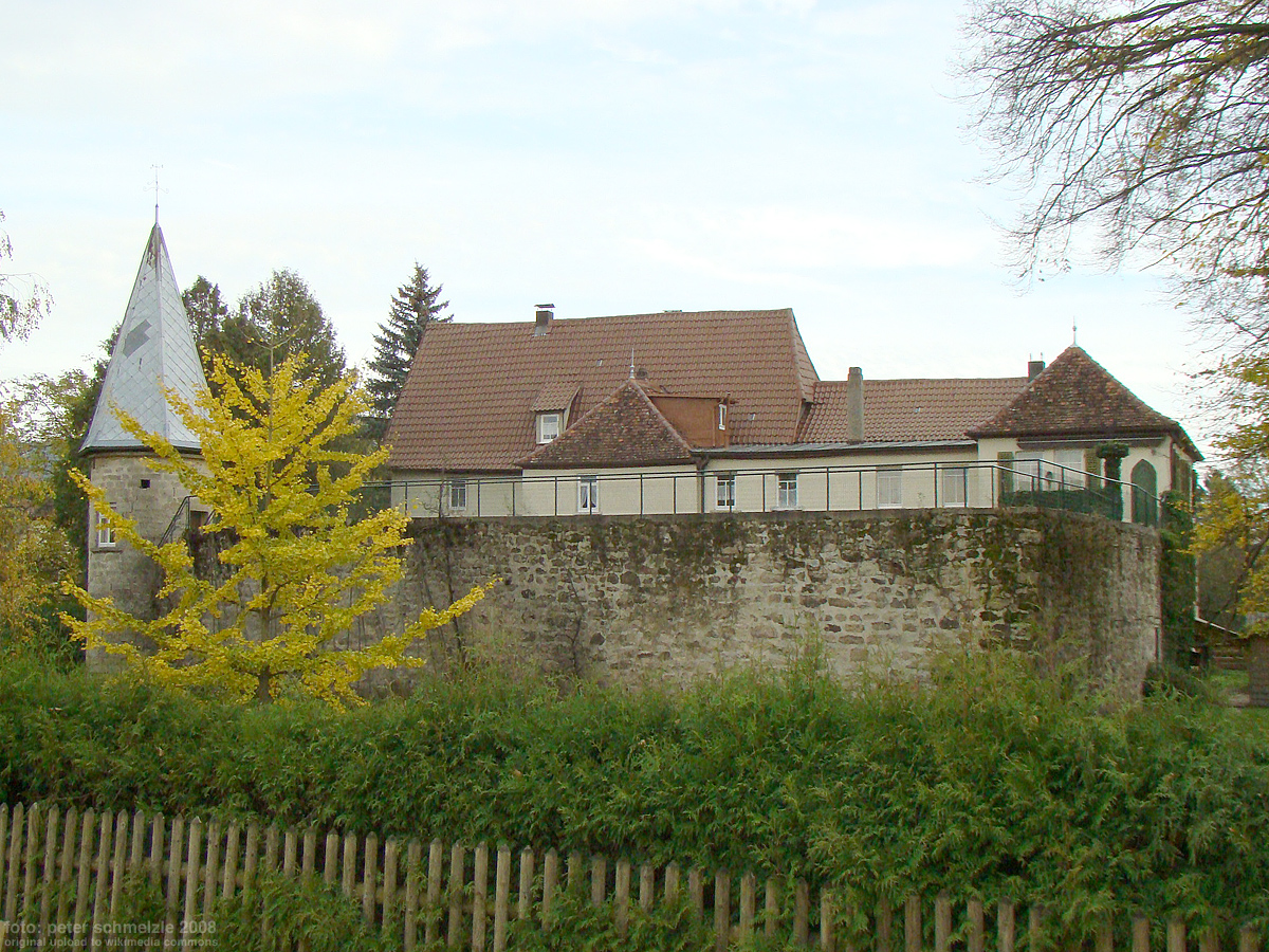 Schloss in Bretzfeld-Adolzfurt